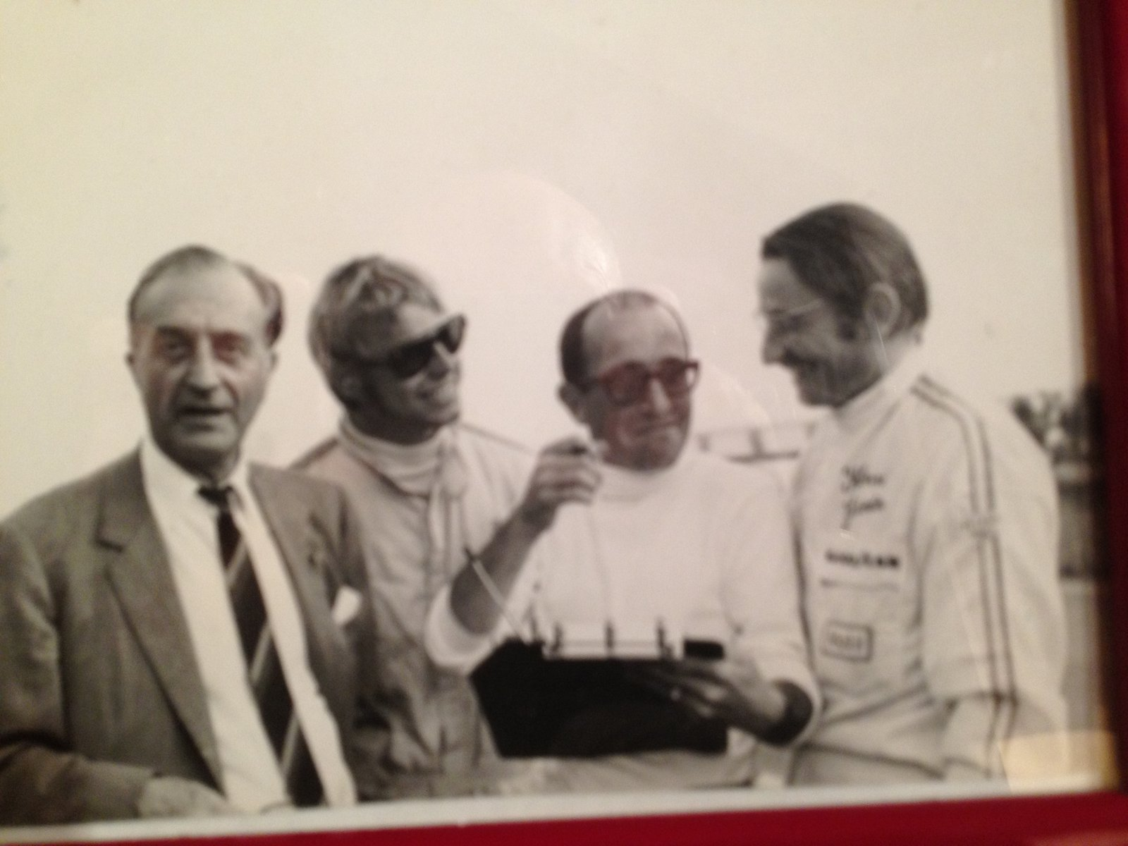 Photo avec CFS